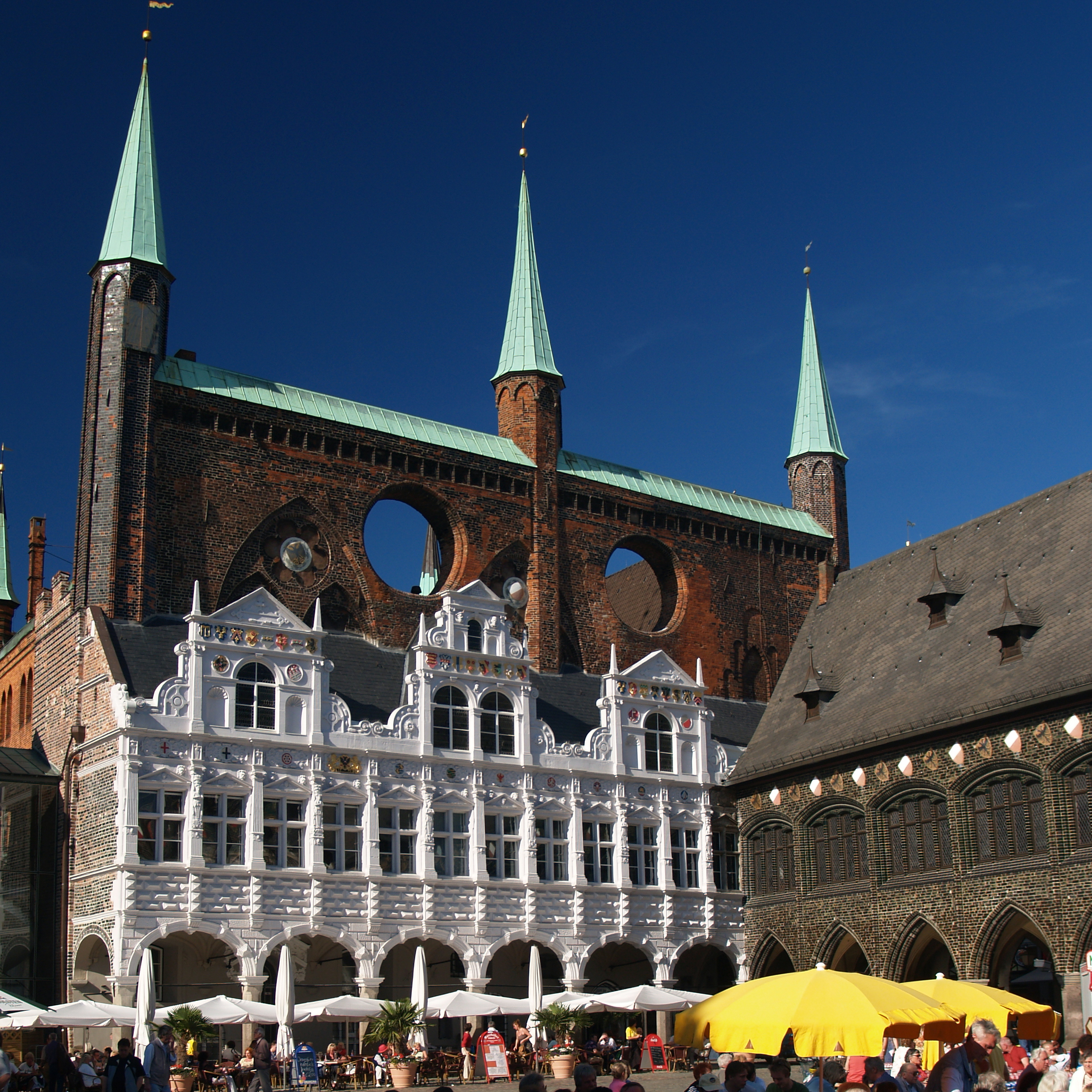 Lübeck Rathaus-Anbau